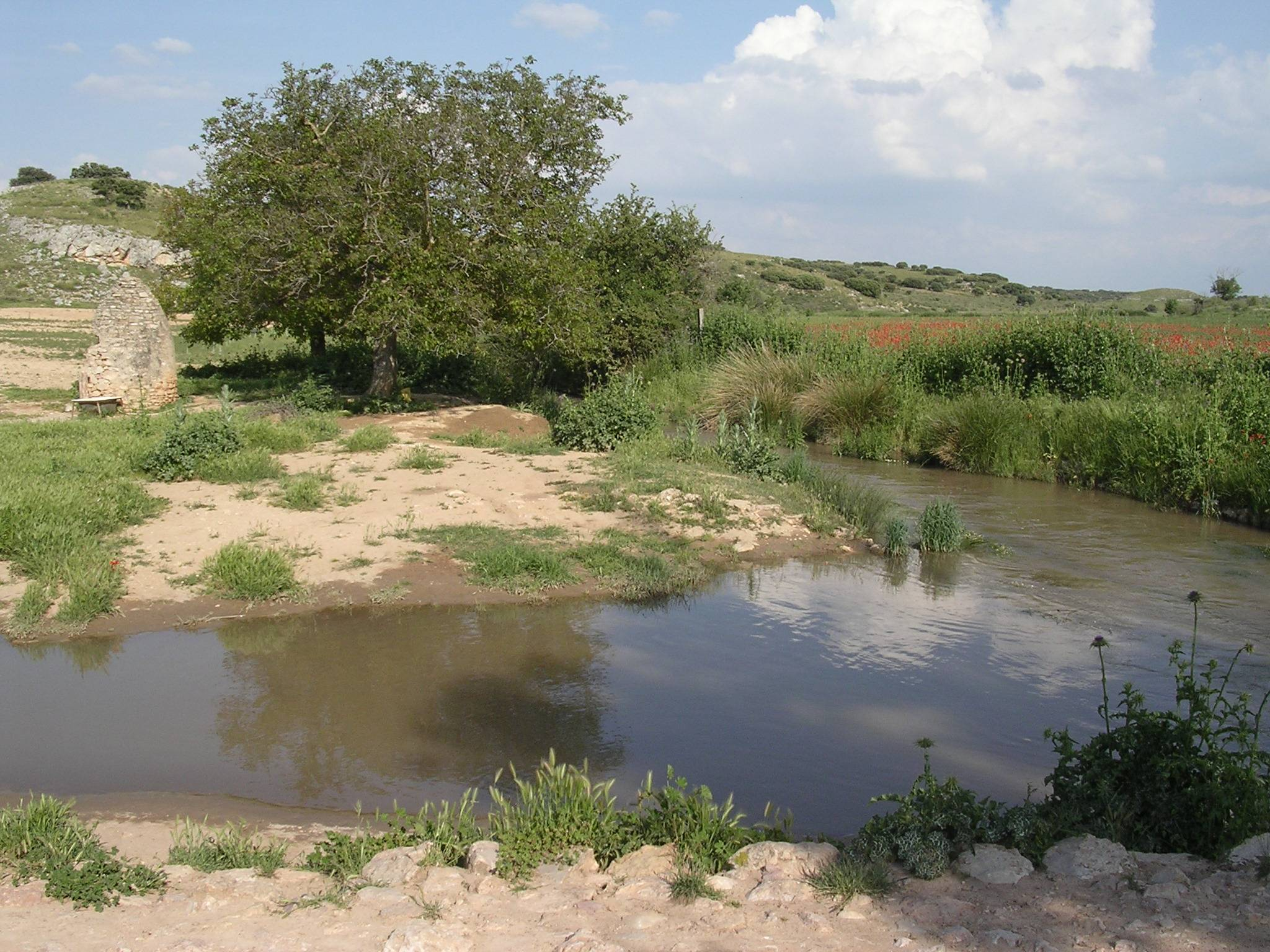 Remanso del río Córcoles a su paso por el paraje del Molino de la Pasadilla (T.M. de Villarrobledo); en la primavera de 2004.